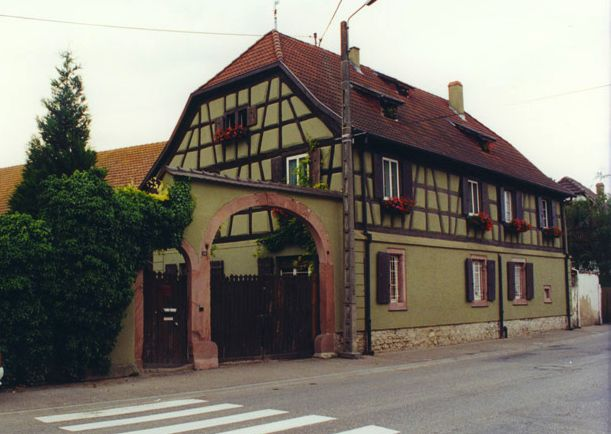 Ferme 26 rue Principale 68320 Muntzenheim